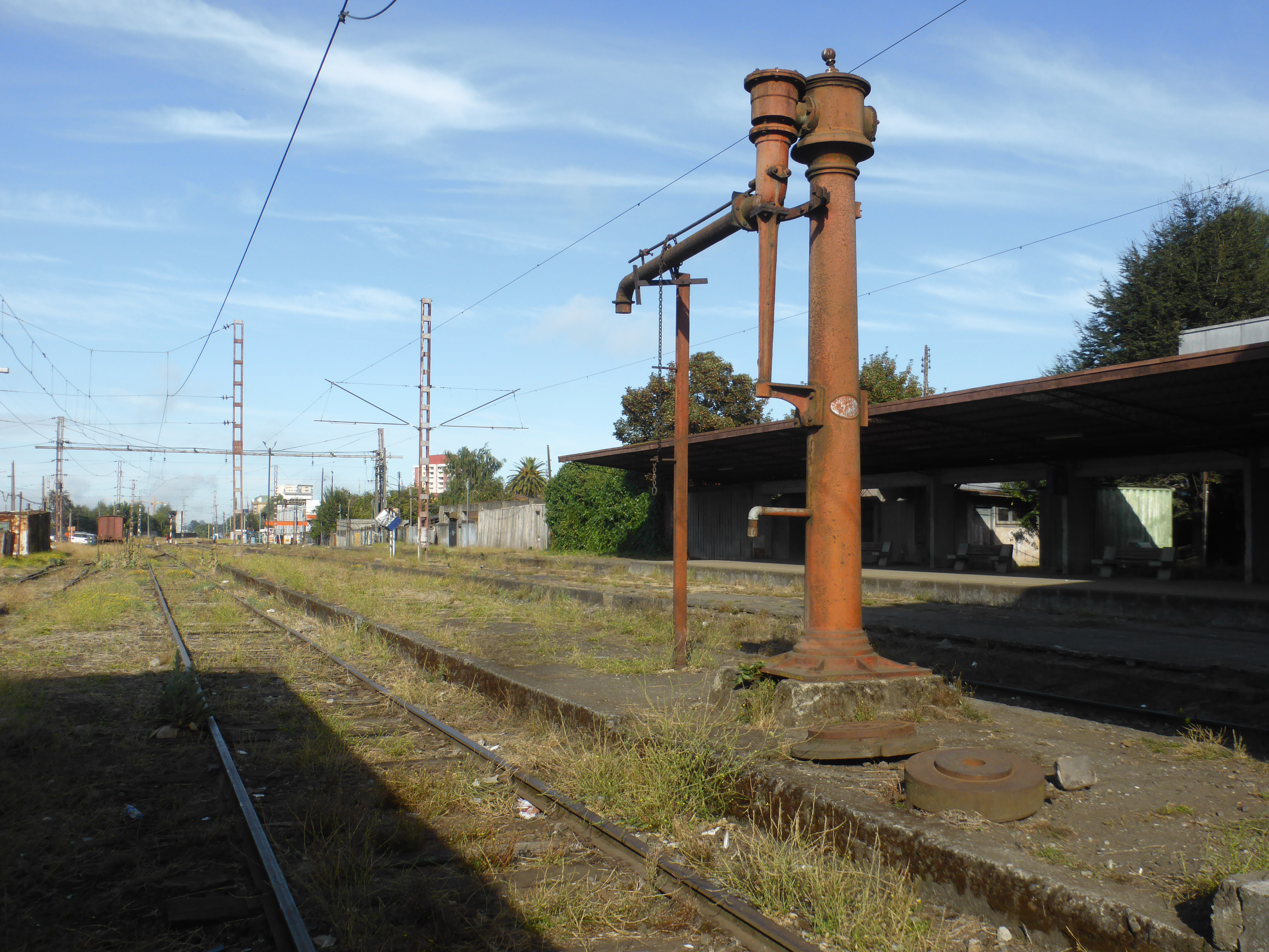 Aguada, grúa de agua, o "caballito de agua", del año 1885. Grifo de grandes dimensiones, para suministrar agua a las locomotoras de vapor. Construido por: "Stothert & Pitt, Limited, Engineers", en Bath, Inglaterra.